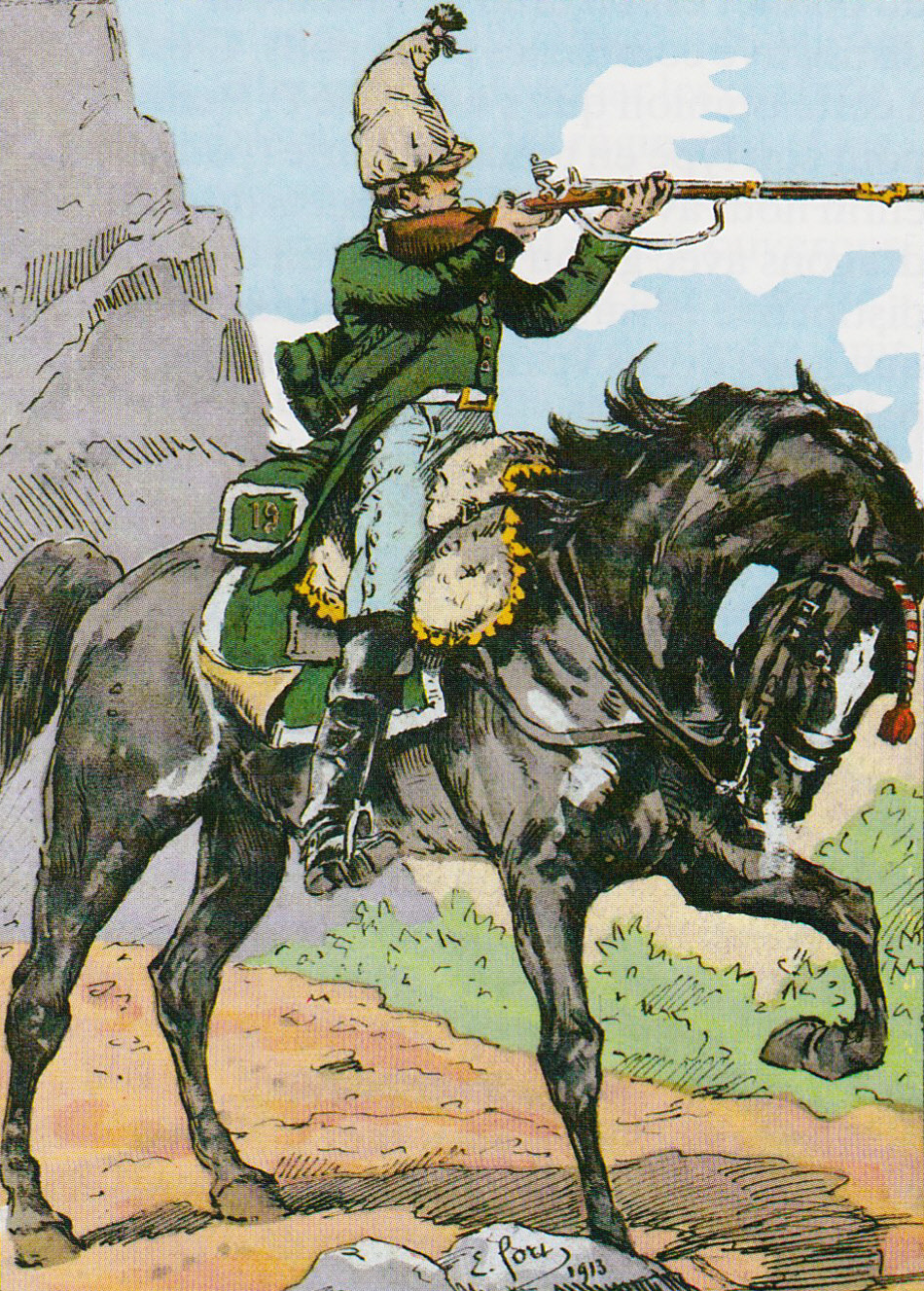 Dragon français du 19e régiment en Espagne, 1811.